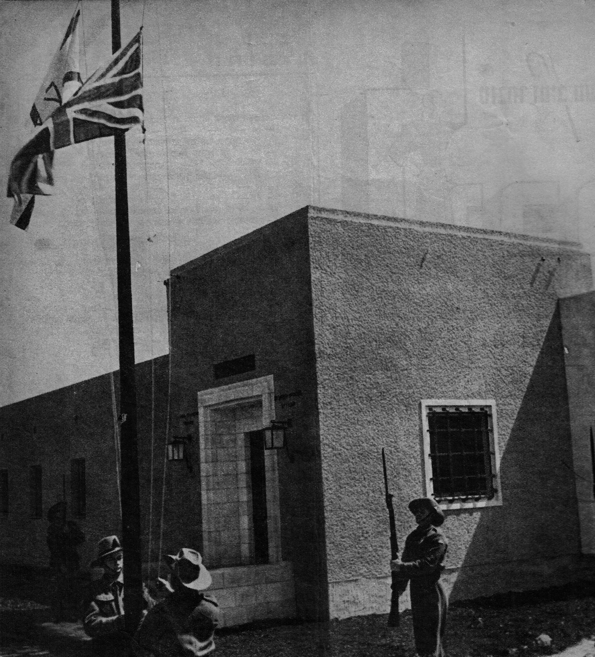 דגל ישראל ודגל בריטניה מונפים על ידי אנשי he:משטרת היישובים העבריים